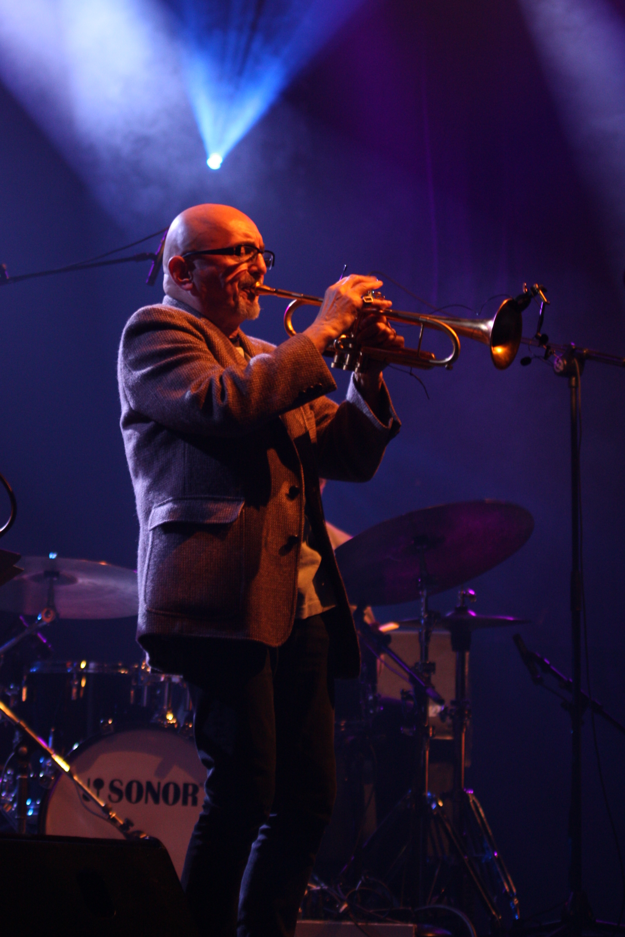 44. Deutsches Jazzfestival Frankfurt 2013: Tomasz Stanko